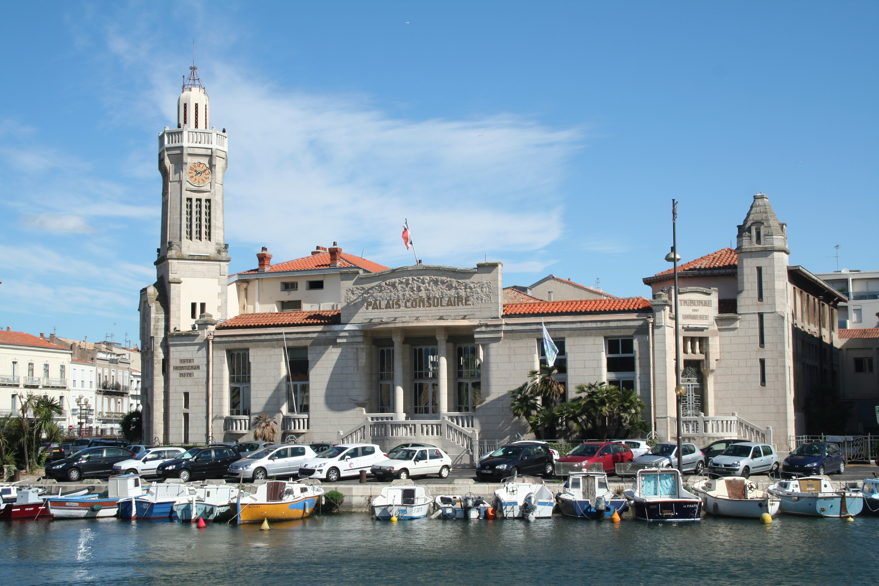 Sète (Hérault) - Ancienne chambre de commerce.